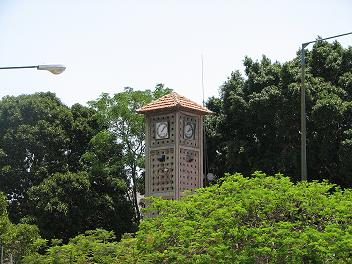 מגדל השעון במרכז שכונת אפרידר באשקלון.